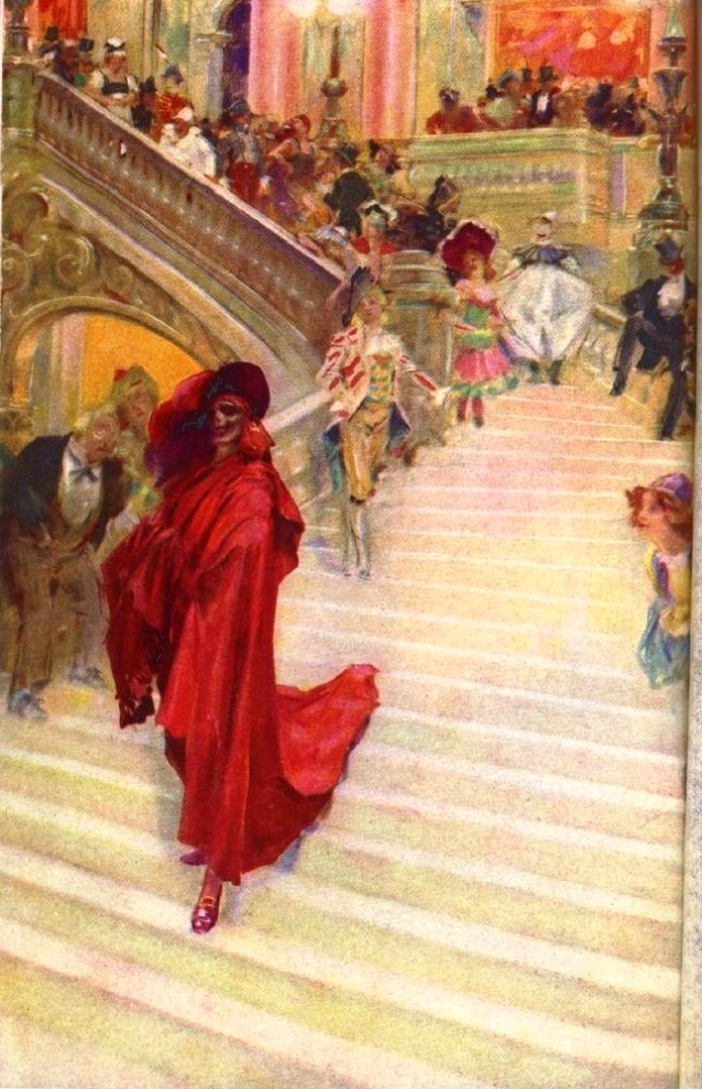 L'une des cinq aquarelles d'André Castaigne illustrant la première édition américaine du Fantôme de l'Opéra de Gaston Leroux (1911).